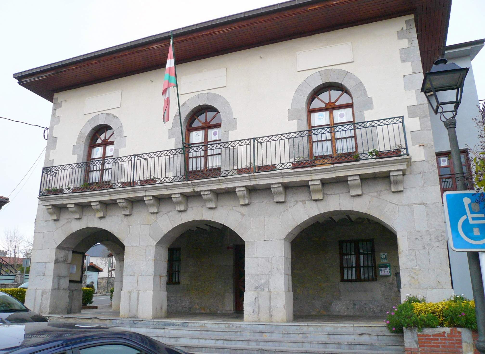 Ayuntamiento de Gautegiz Arteaga (Vizcaya)